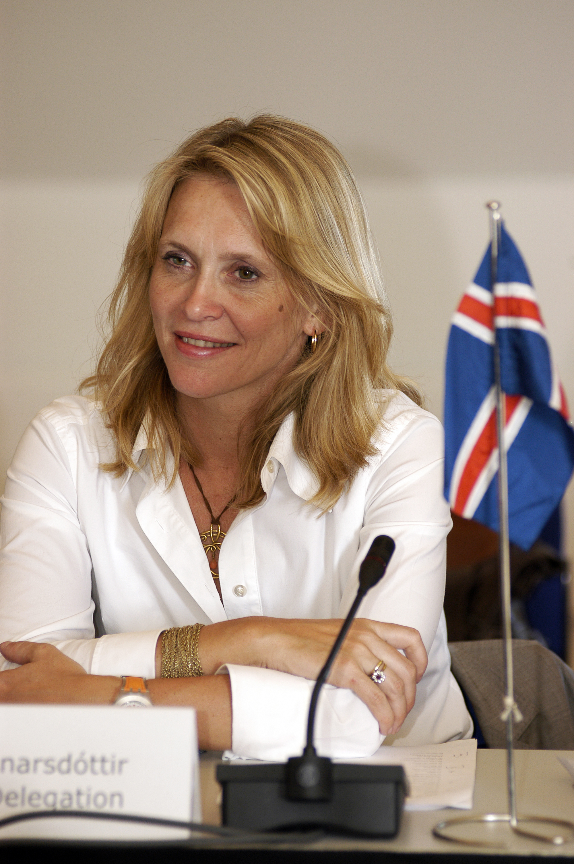 Islands kulturminister Þorgerður K. Gunnarsdóttir.